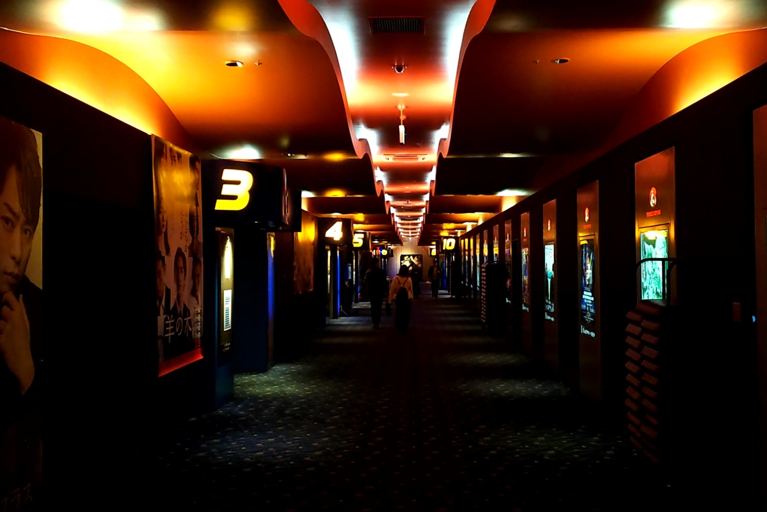 TOHOシネマズ木曽川。